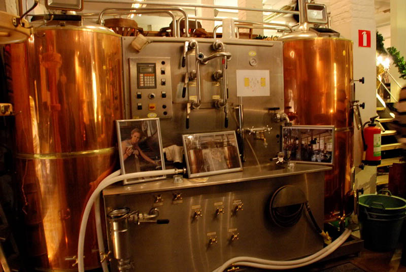 Brouwinstallatie stadsbrouwerij Gruut